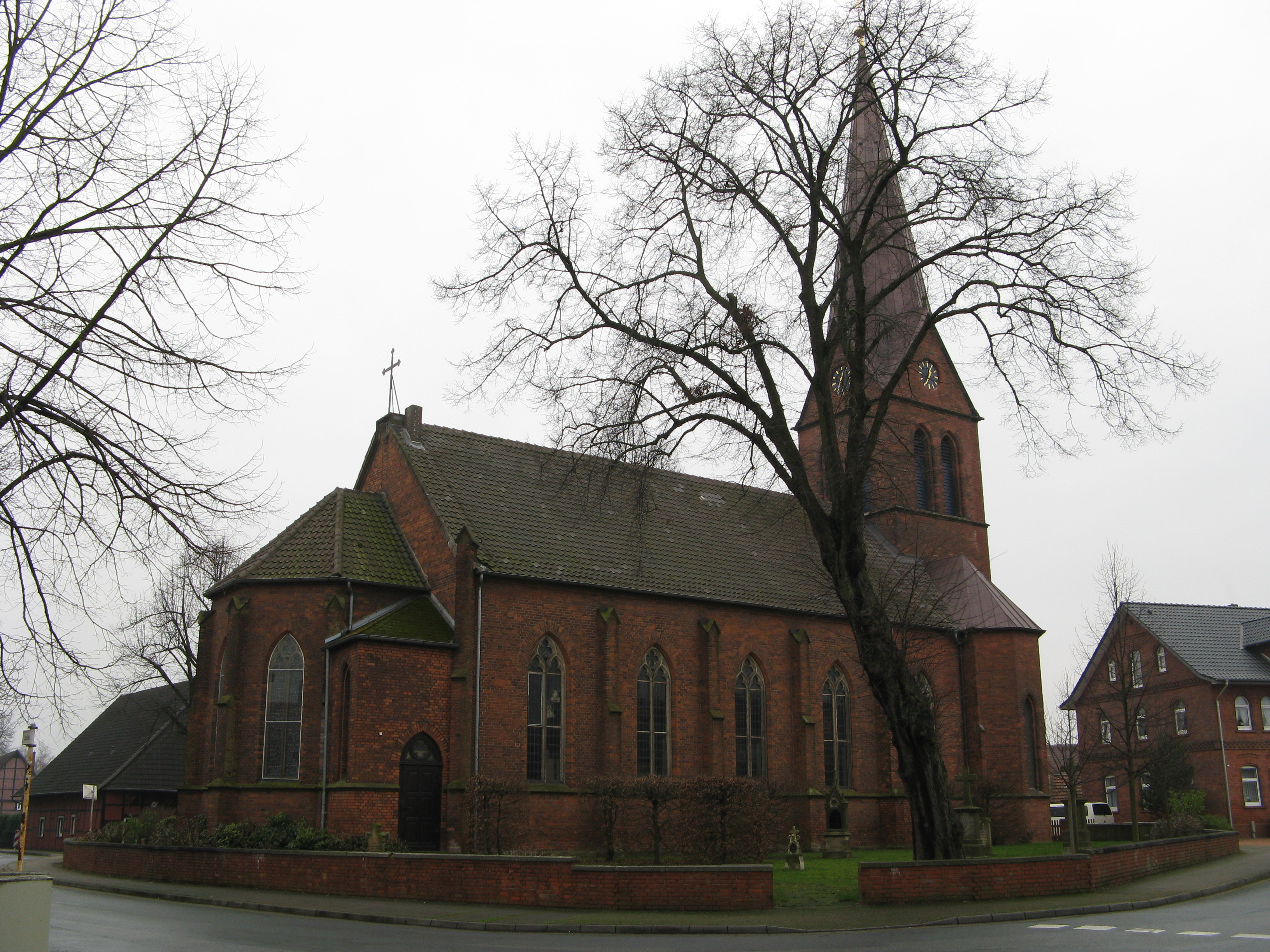 Kirche in Minden-Dankersen, Nordrhein-Westfalen. Die aus roten Backsteinen erbaute Dorfkirche (St. Peter und Paul) wurde 1860 anstelle einer zu klein gewordenen Dorfkapelle errichtet.